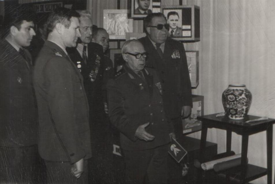 Garnizon Przasnysz, w sali tradycji mjr Wiesław Rogowski prezentuje tradycje JW 4420